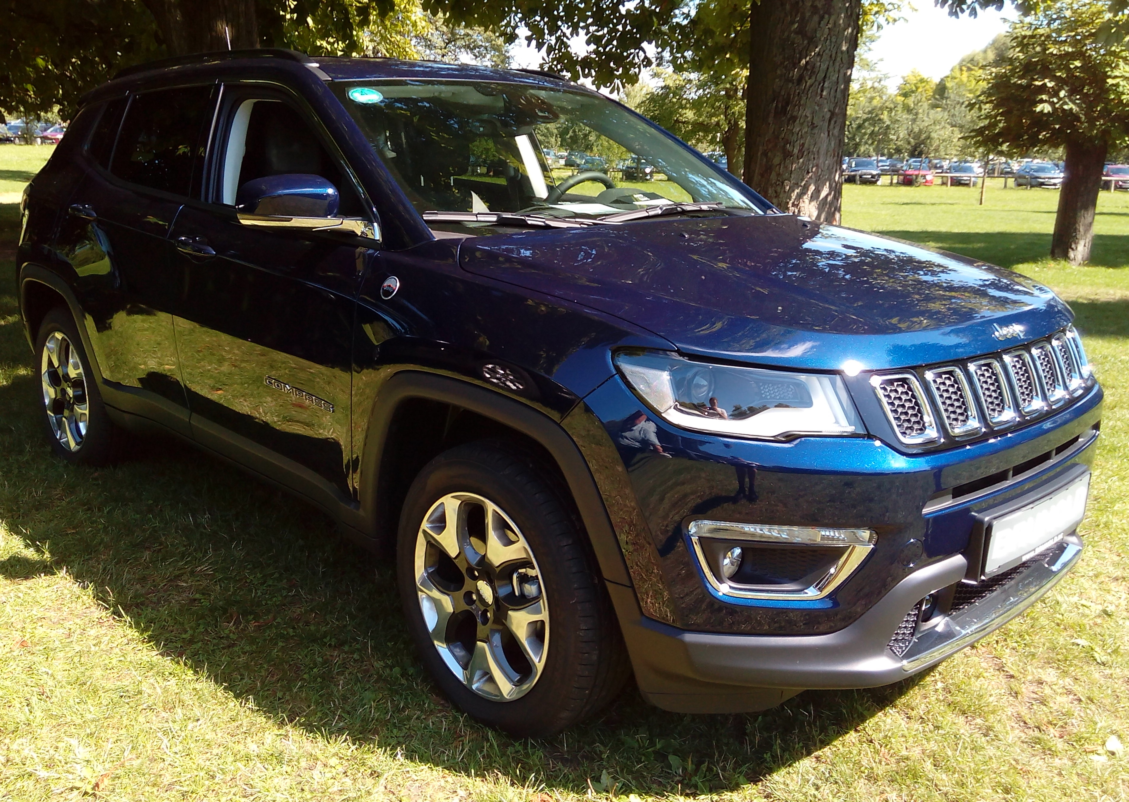 Jeep Compass auf der Automesse Monrepos